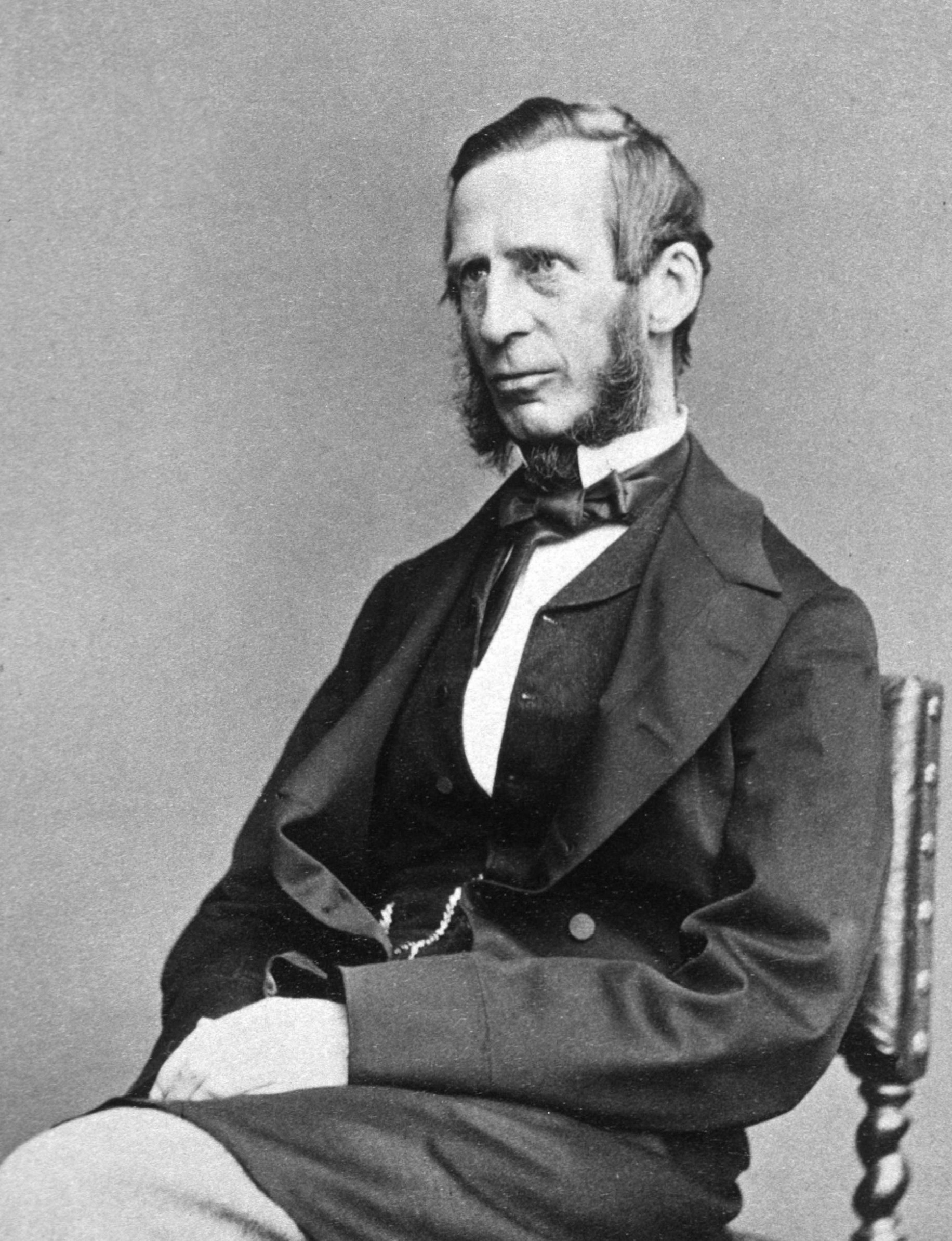 Sir George Edward Paget M.D. (1809–1892)